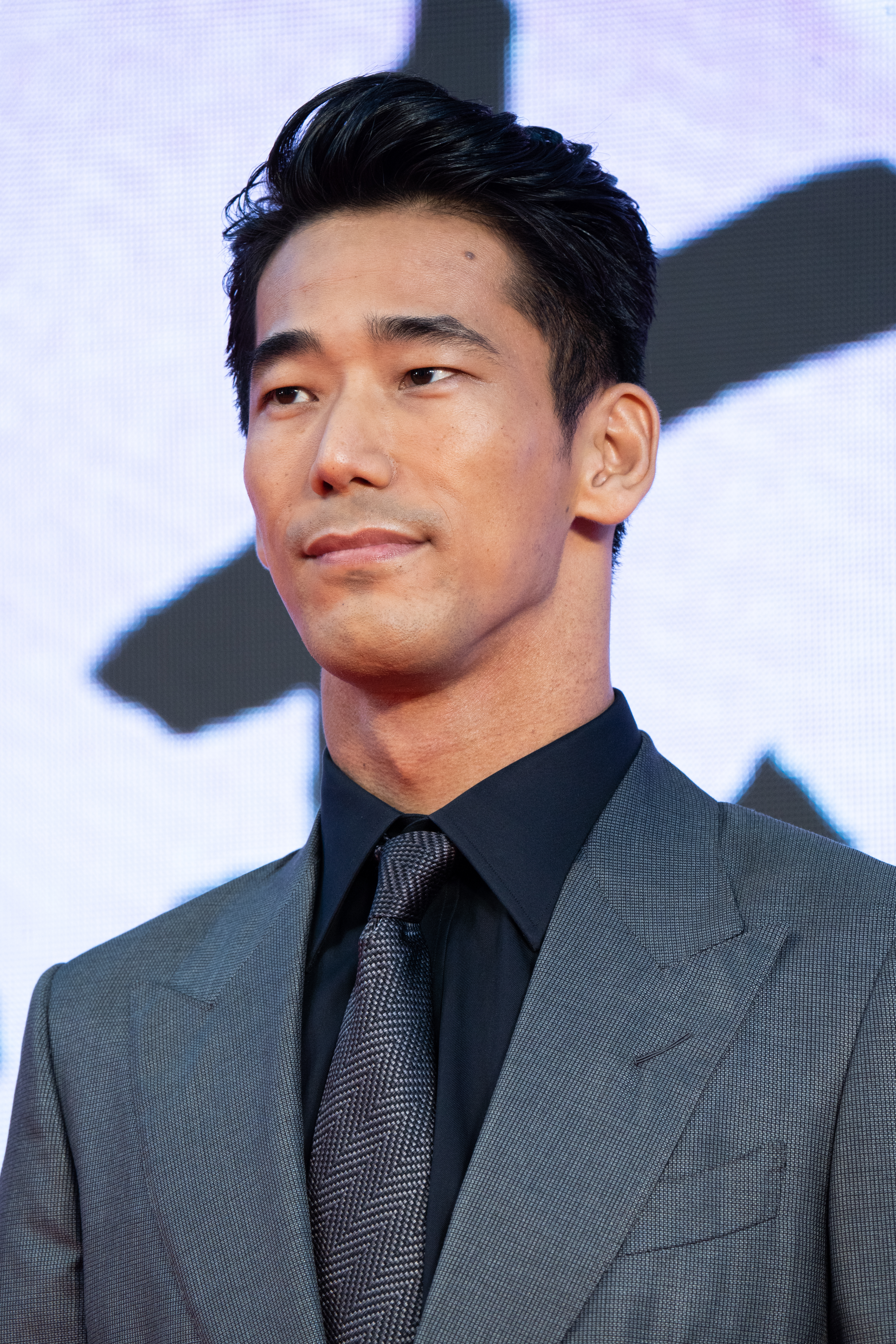 第32回 東京国際映画祭 オープニングセレモニー 小林直己 (その瞬間、僕は泣きたくなった)